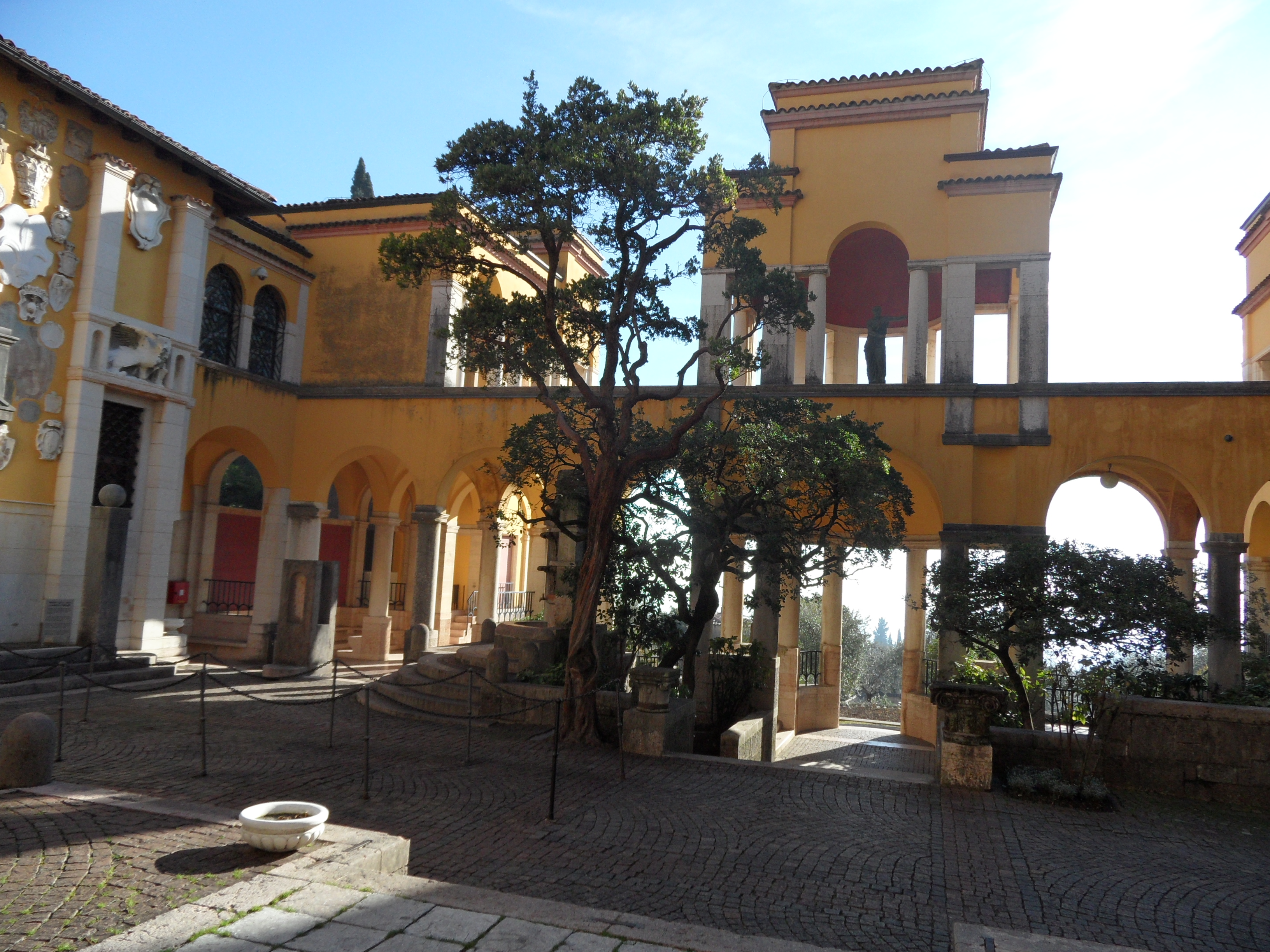 Vittoriale